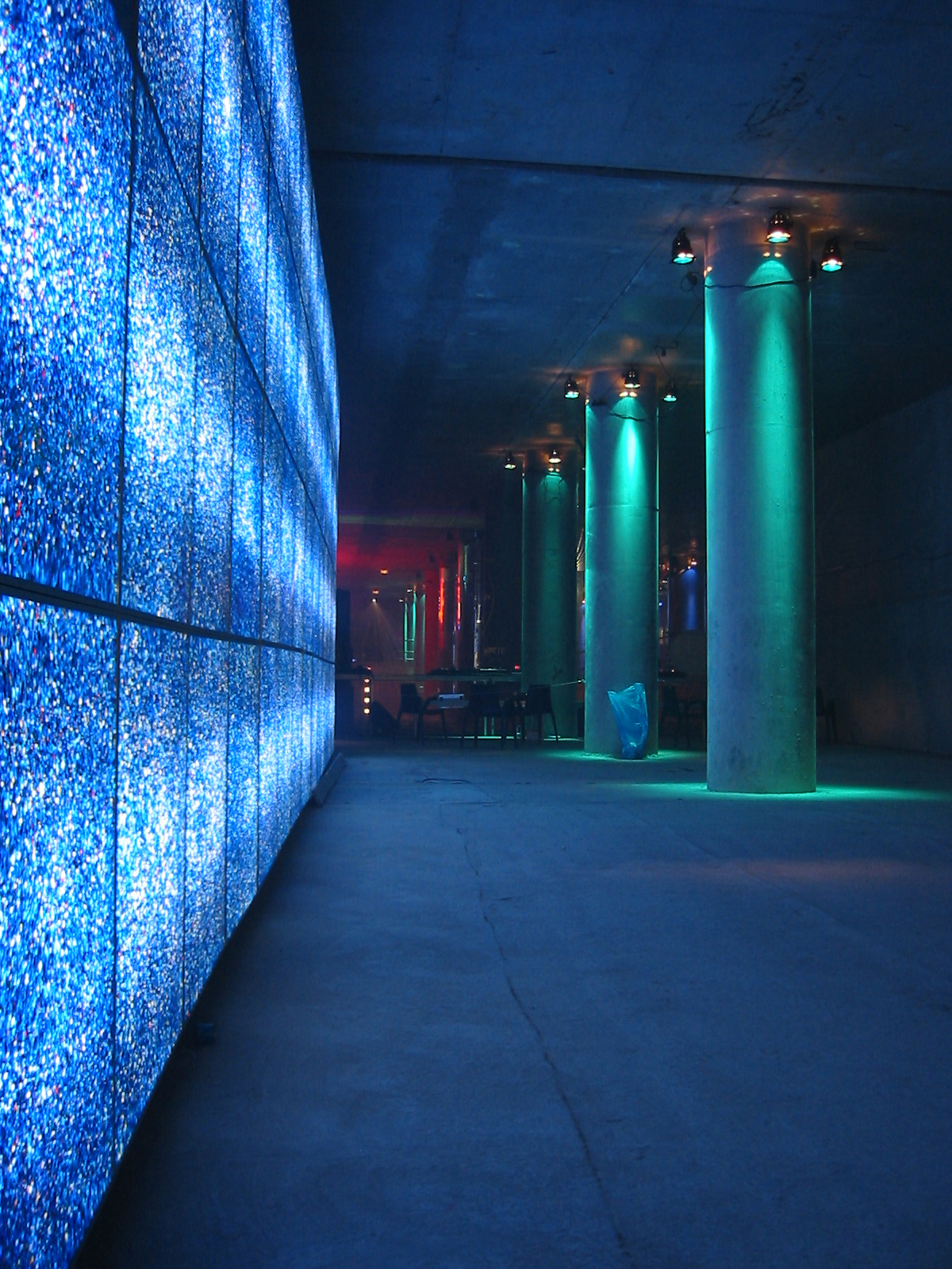 Vorleistungstunnel für zukünftige U3/U10 am Potsdamer Platz in Berlin, derzeit Nutzung für Ausstellungen etc.